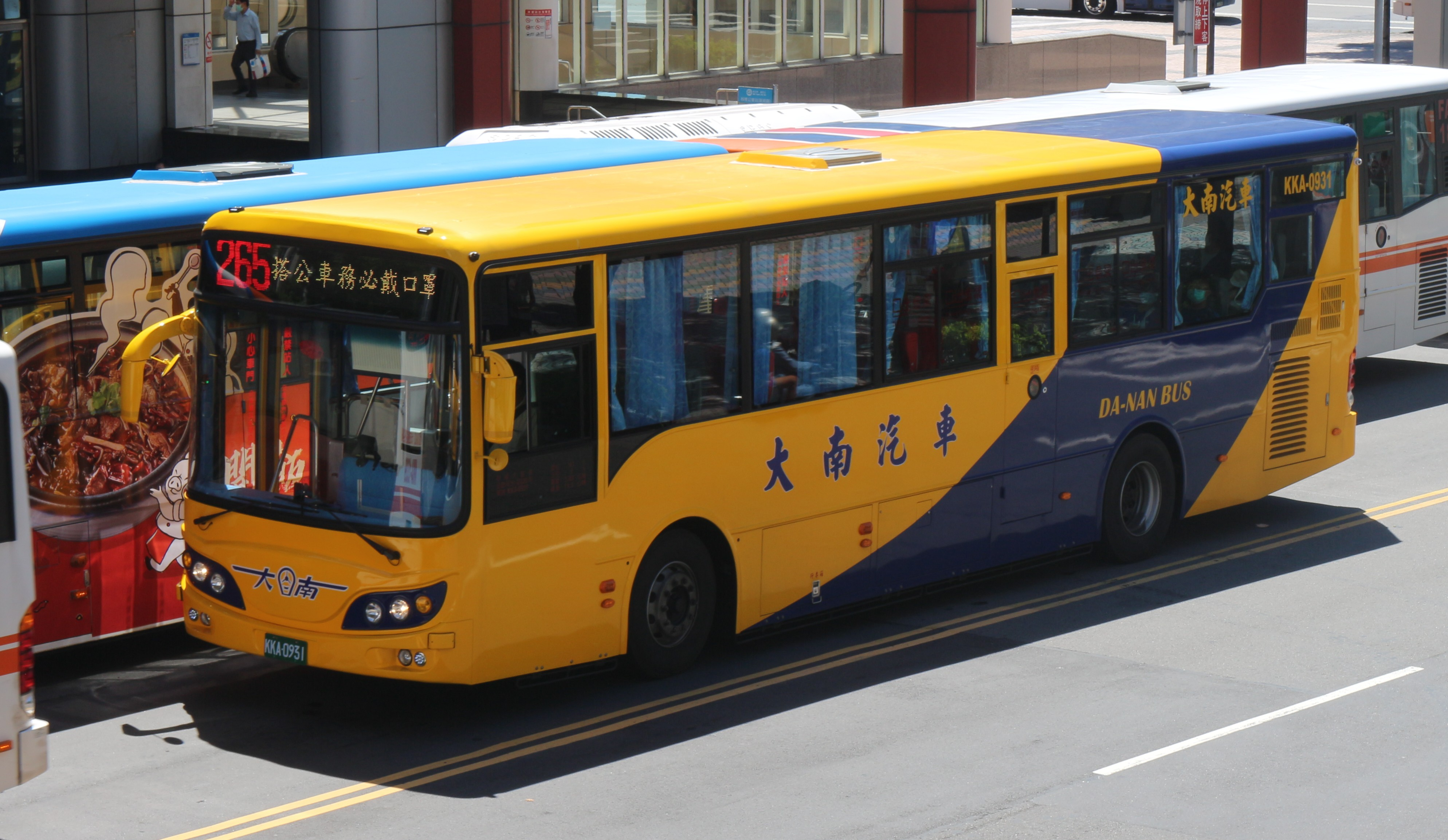 大南汽車2020 HINO RK8JRVA-KJF KKA-0931 265